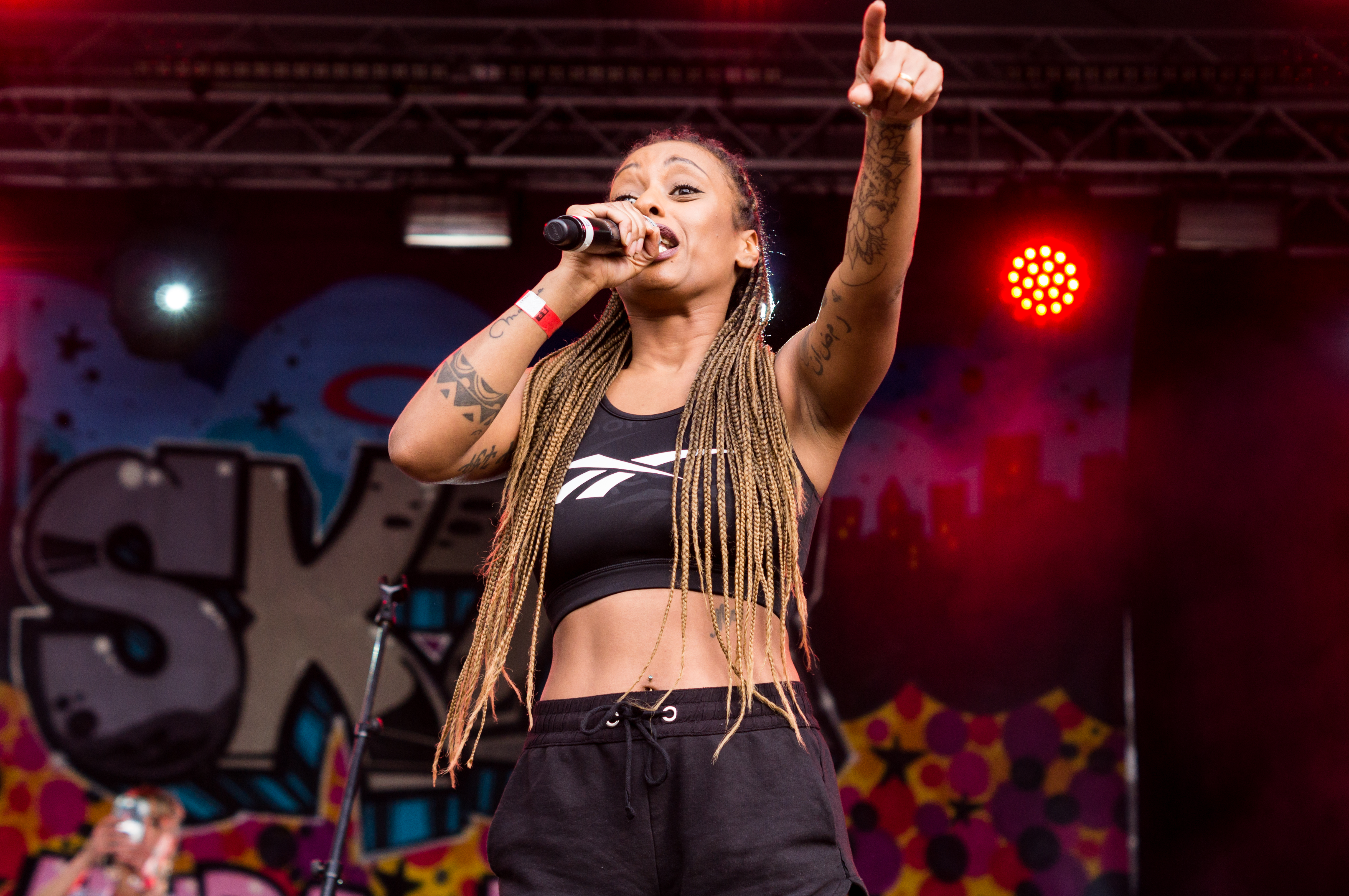 Die Rapperin SXTN auf dem Kosmonaut Festival 2017 in Chemnitz